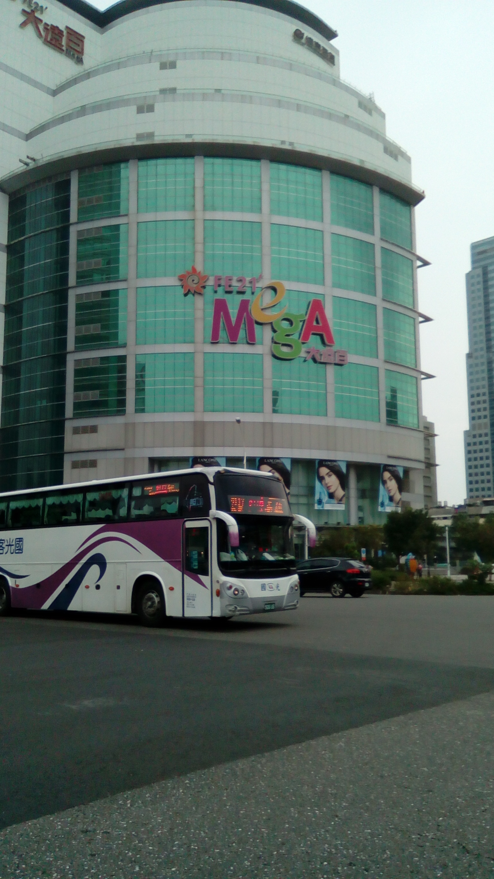 位於三多商圈內 中山路與三多路交叉口處